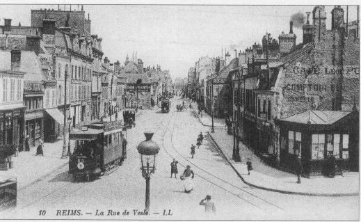 carte postale de Reims montrant la Rue_de_Vesle, le_tram_et_le ce dit être une automotrice du CBR.